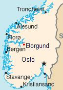 Borgund (Lage)